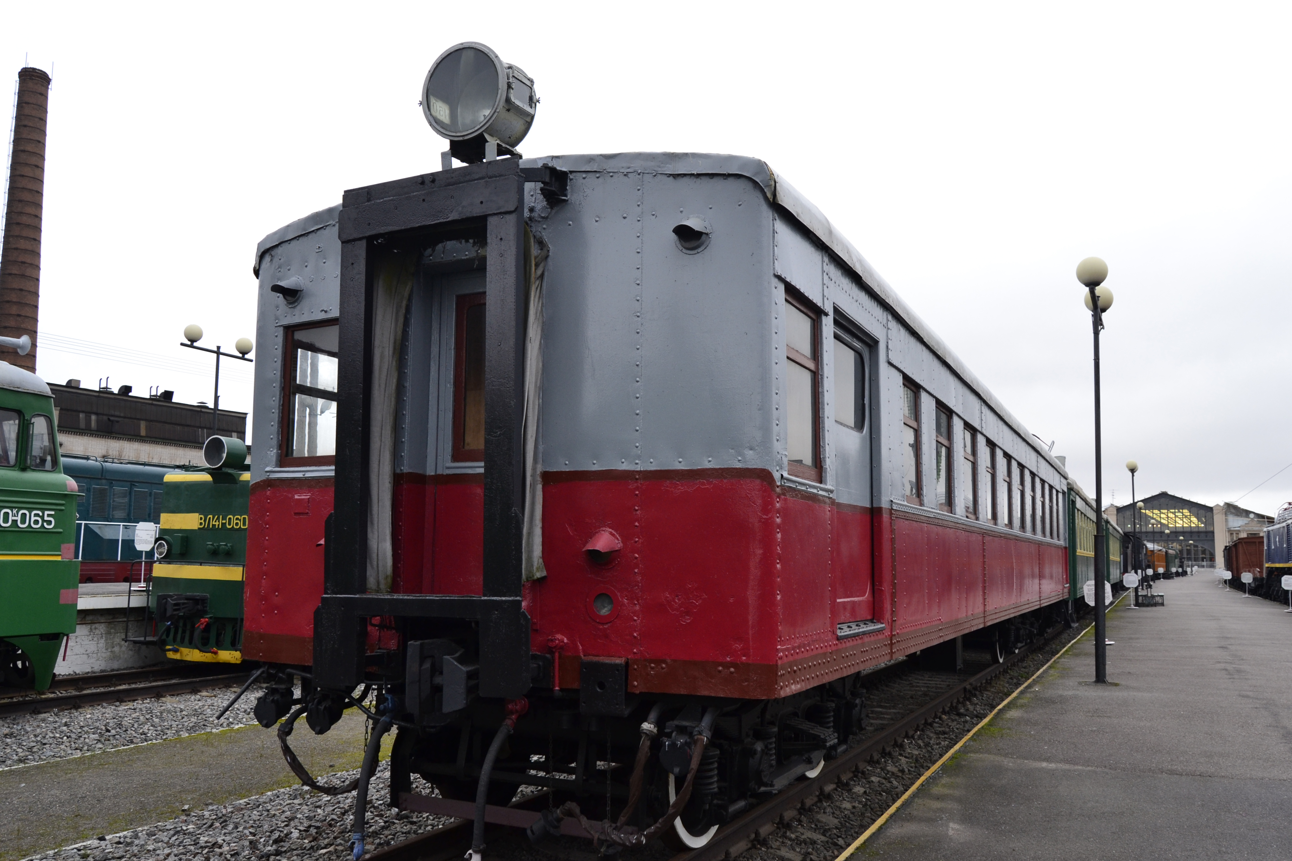 Музей ж/д транспорта